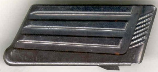 Okvirček M1888 za puški Mannlicher M1888 in M1895.